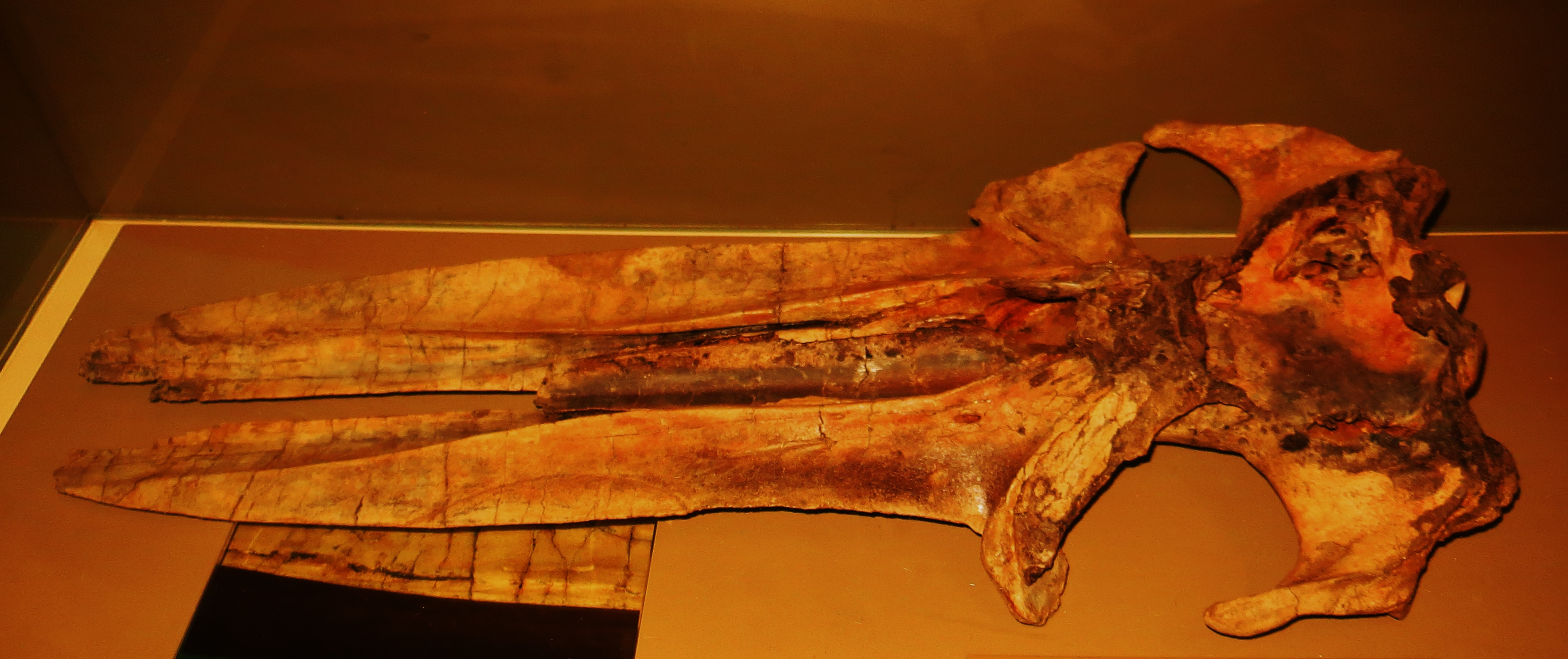 Fossil - Took the picture at Museum of Natural History, Karlsruhe